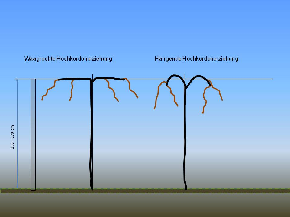 Hochkordonerziehung mit zwei Varianten.